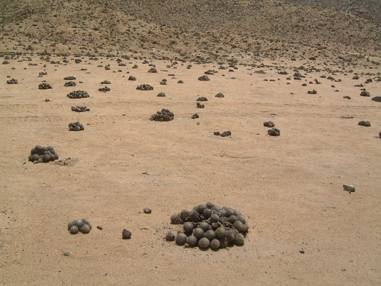 Parque Nacional Pan de Azúcar, Chile 8.11.2005 By Herman Luyken En realidad la imagen corresponde a Copiapoa cinerascens (Salm-Dyck) Britton & Rose 1922, que vive en el Parque Nacional Pan de Azúcar y a lo largo de la costa al norte de Chañaral (Región de Atacama). Copiapoa solaris (Ritter) Ritter 1980 vive más al norte, en La región de Antofagasta -desde el norte de Paposo al norte de Mejillones-. Para más información visite